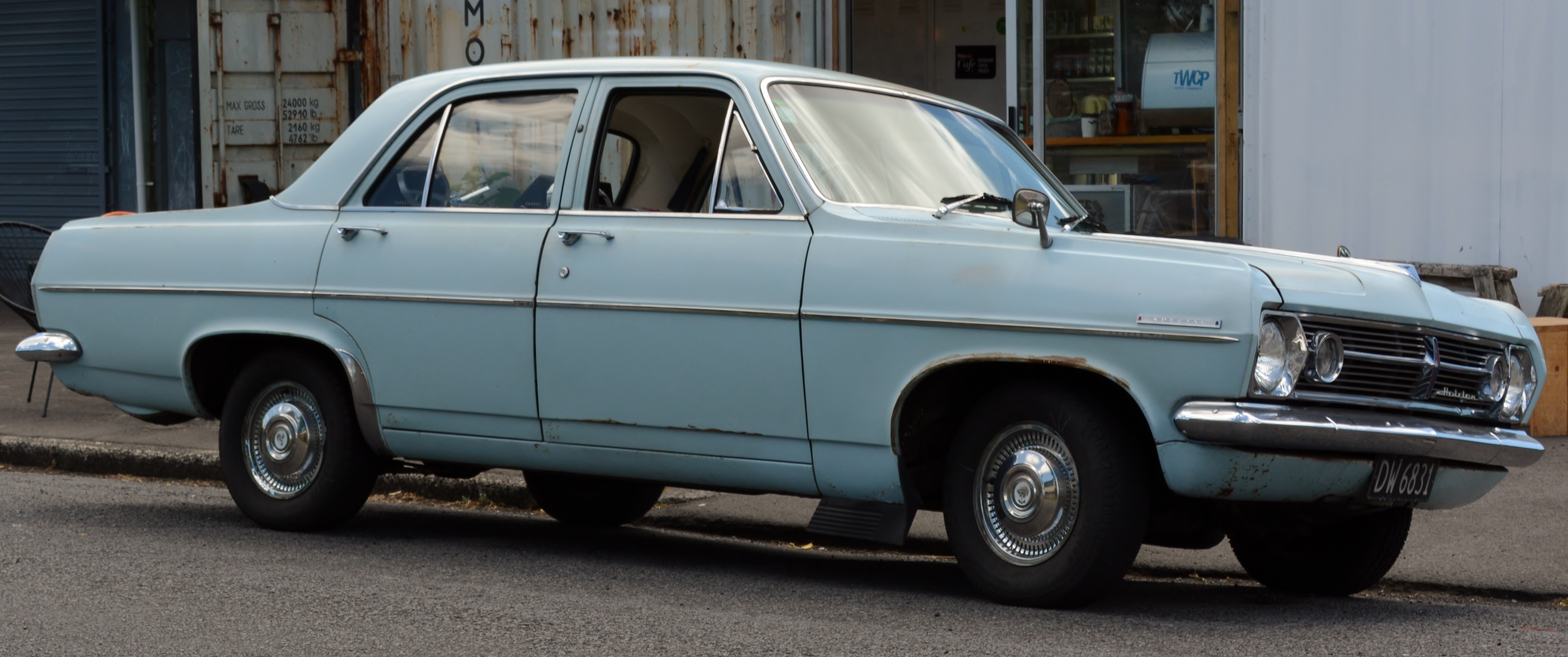 1966 Holden HR Special